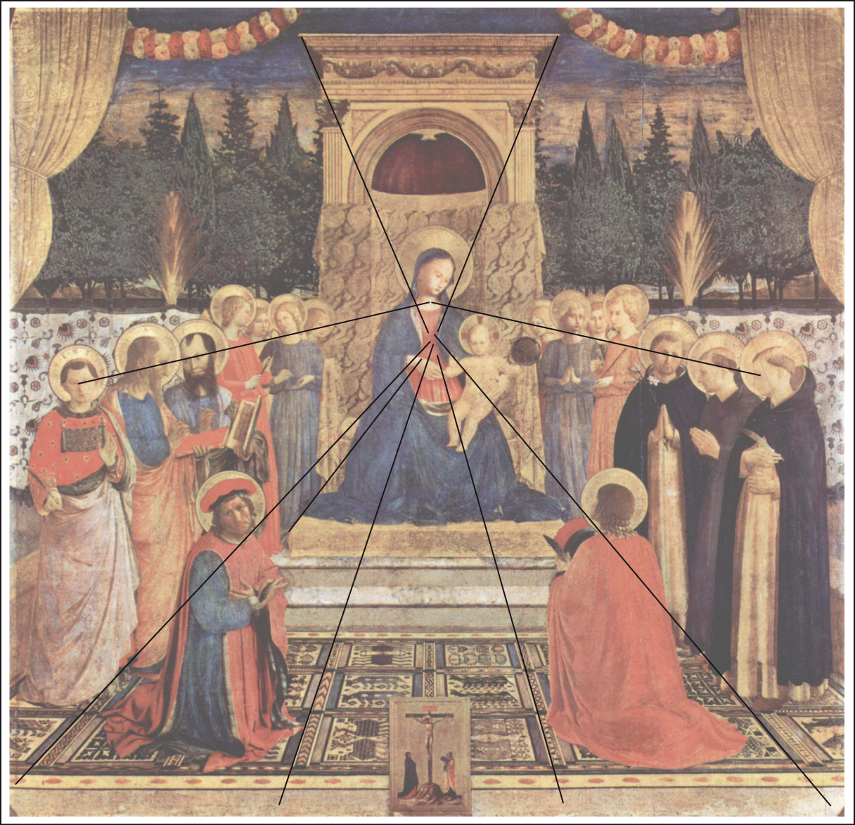 Schéma des lignes de forces sur la Pala di San Marco de Fra Angelico